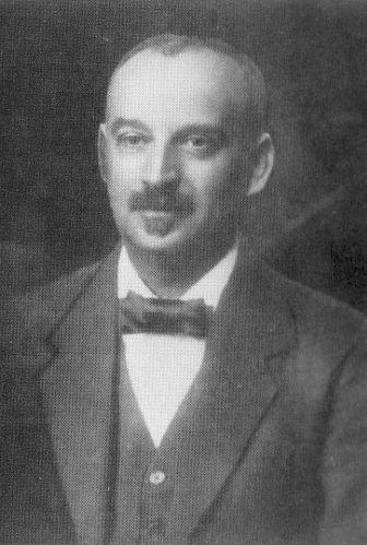 August Gottschalk (geb. 28. Oktober 1870 in Niederheid, Kreis Geilenkirchen, gest. 1. Juni 1927 in Esens), siehe August-Gottschalk-Haus